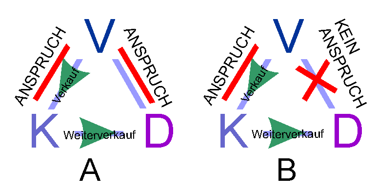 Anspruch/Kein Anspruch bei Actio de in rem verso